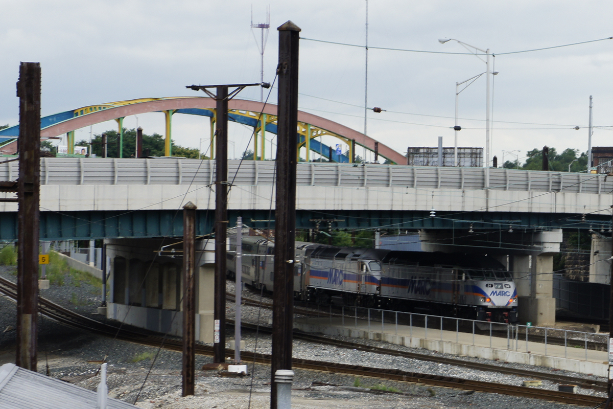 星期日開離巴爾的摩賓州車站的MARC列車